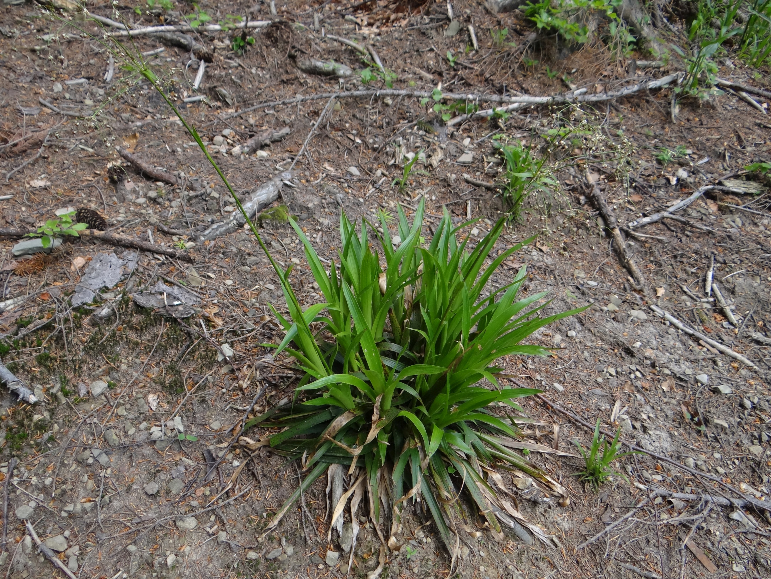 Luzula sylvatica (location: Poland, Beskid Żywiecki, Psmo Policy, Okrąglica)